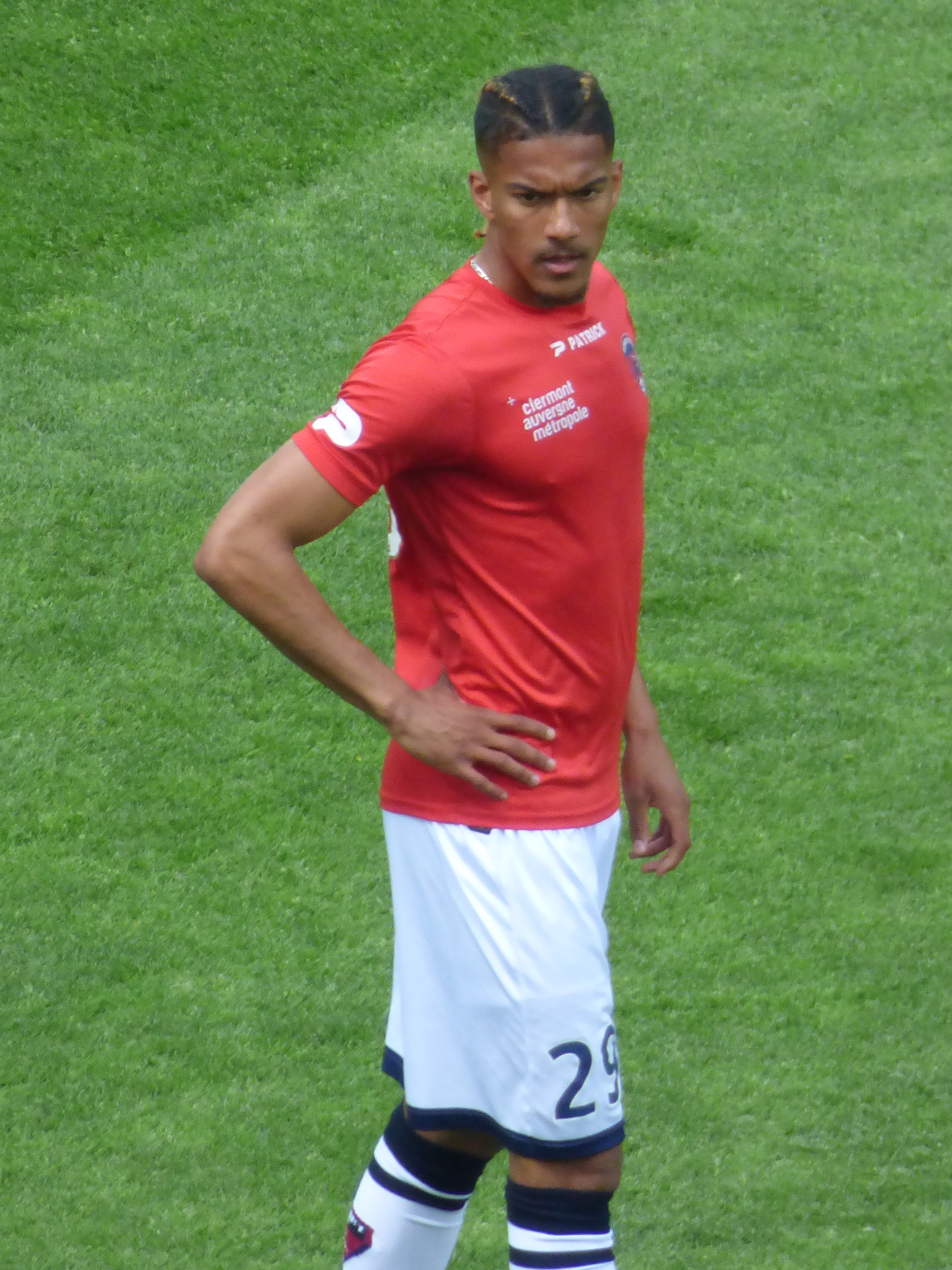 Florian Ayé avant le match RC Lens / Clermont Foot 63, comptant pour la 36ème journée du championnat de France de football de Ligue 2 2018-2019, le 4 mai 2019, au stade Bollaert-Delelis.